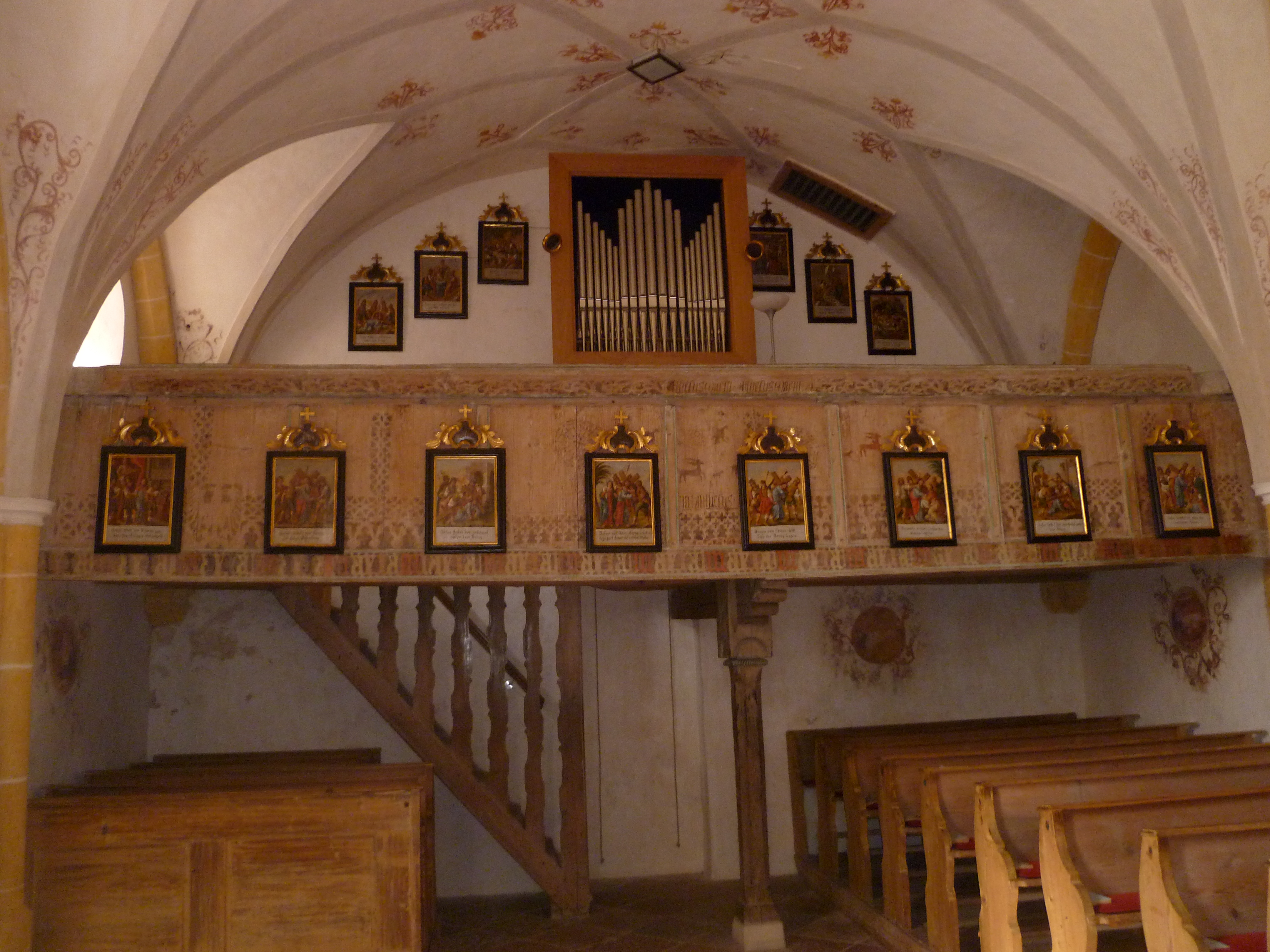 Kath. Filialkirche hl. Kreuz